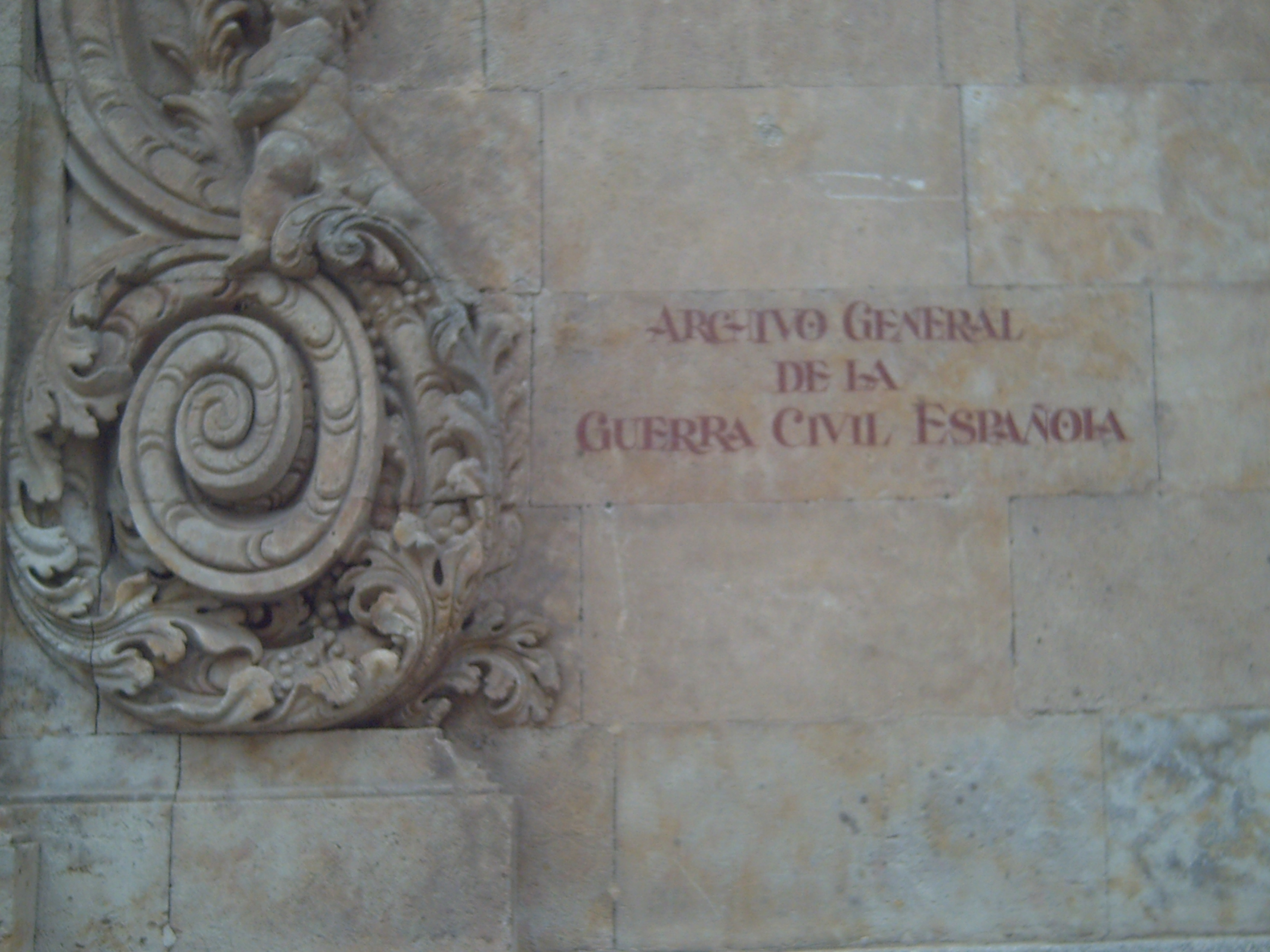 Imagen del Archivo General de la Guerra Civil en Salamanca